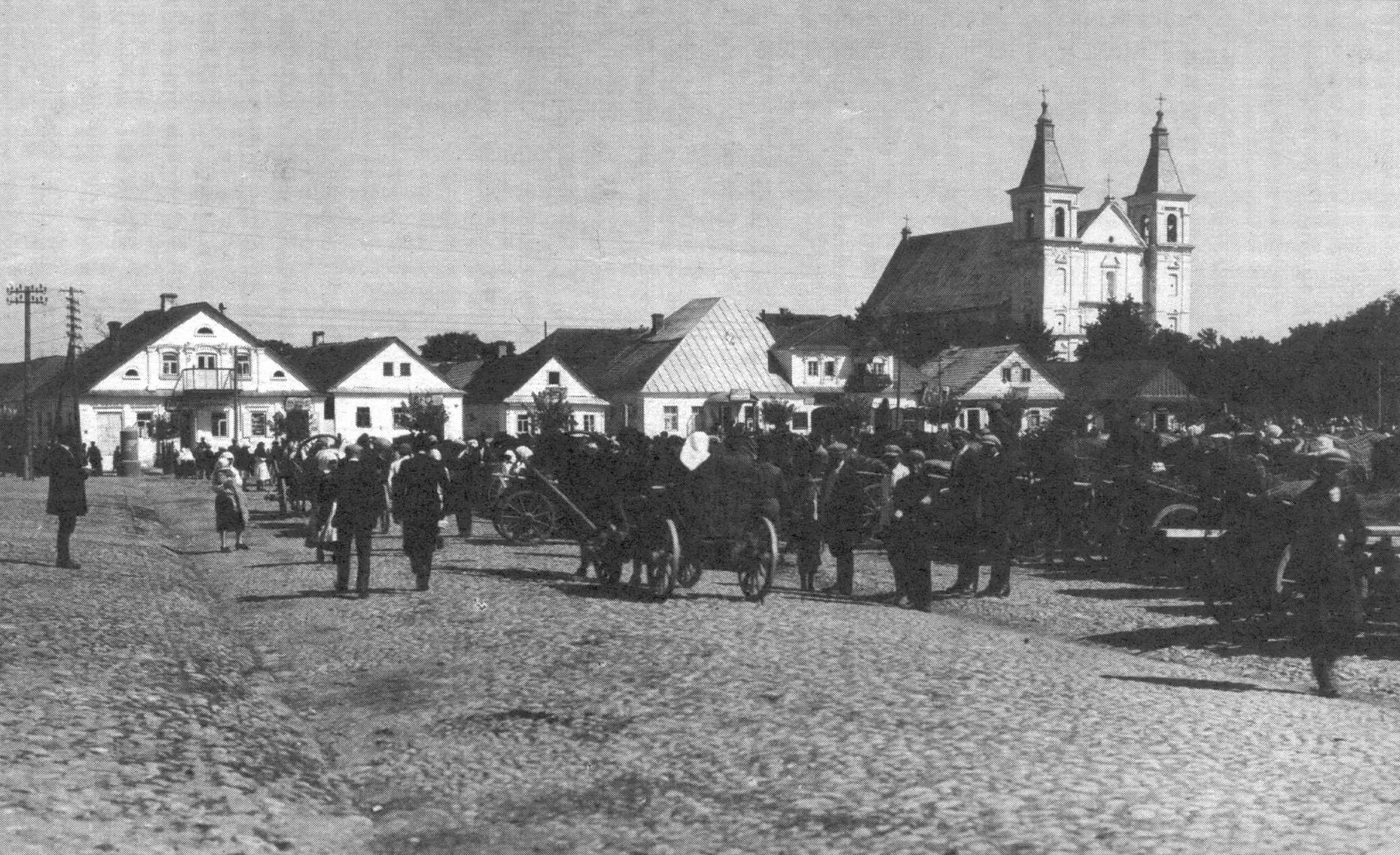 Беларуская (тарашкевіца): Клецак (Klecak), пляц Рынак (plac Rynak)